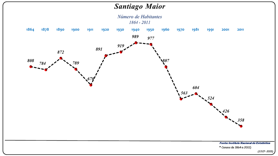 Evolução da População